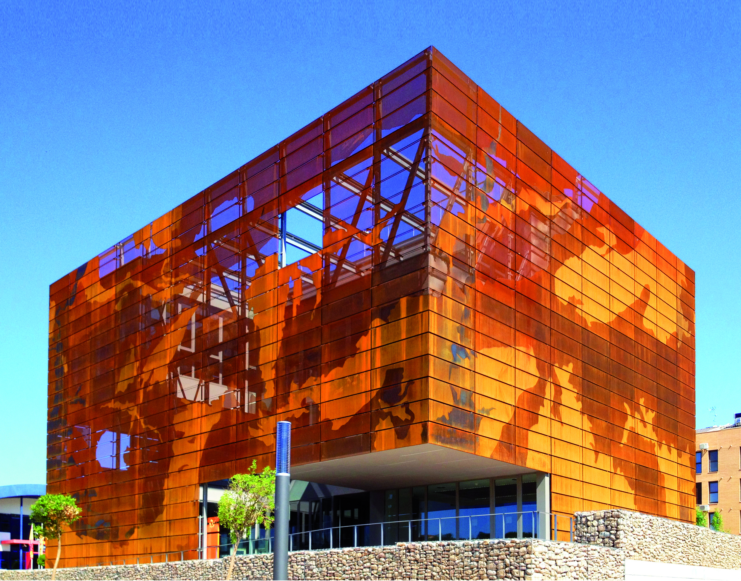 Main Façade. Institut Geològic de Catalunya at Tremp